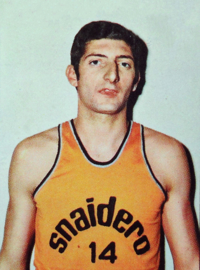 CAMPIONI DELLO SPORT 1969/70-n.311-BISSON (ITA)-PALLACANESTRO